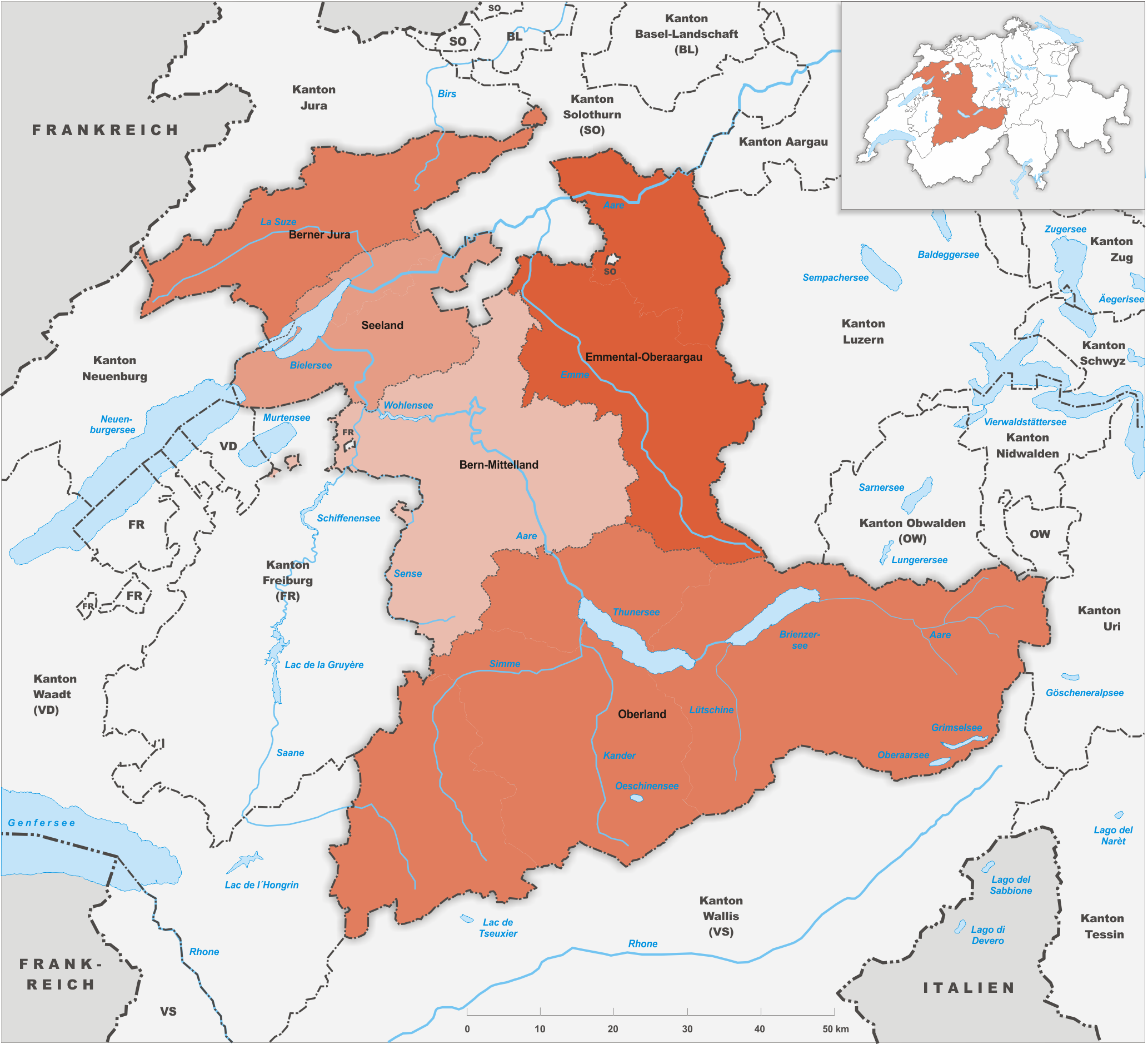 Verwaltungsregionen des Kanton Bern